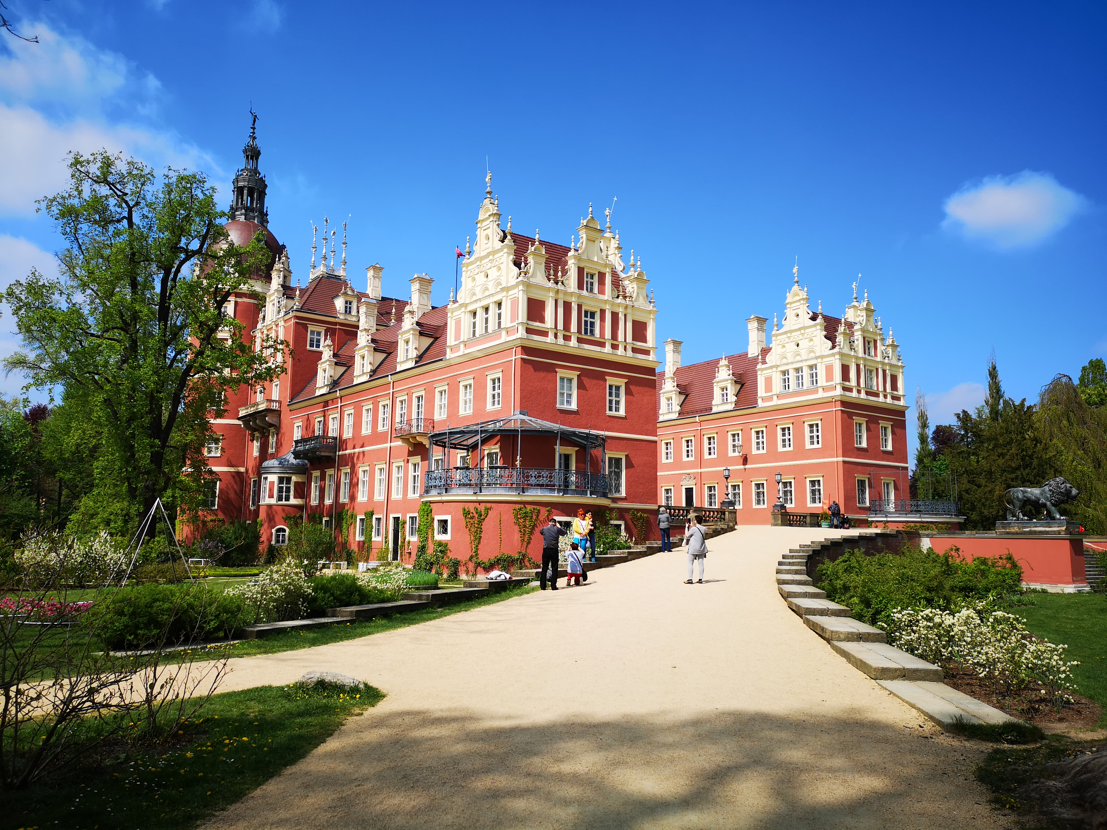 Droga do Nowego Zamku w Parku Mużakowskim. Maj 2019.